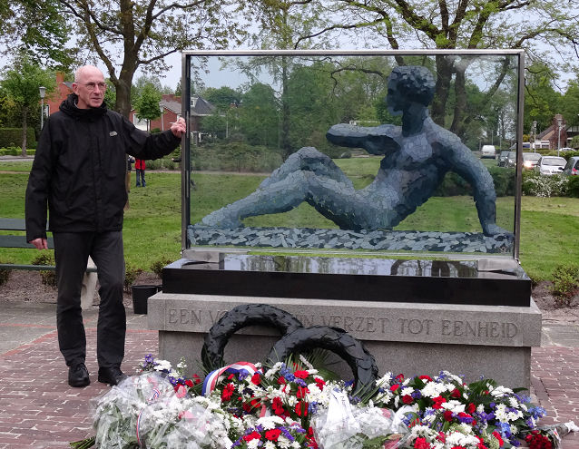 De kunstenaar Mark Witteveen bij het Verzetsmonument in Wildervank, dat hij maakte ter vervanging van een bronzen beeld van Wladimir de Vries.